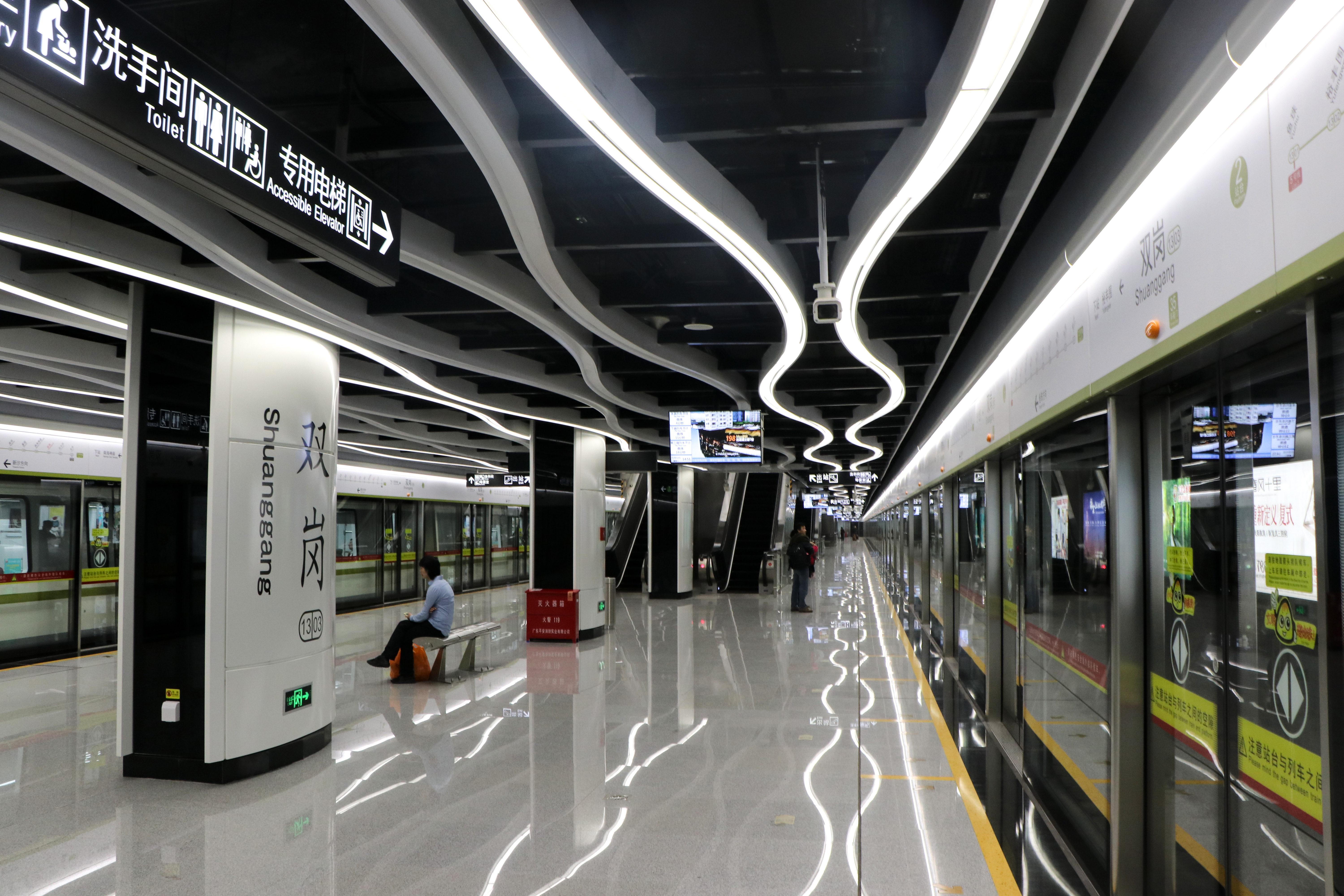 广州地铁双岗站